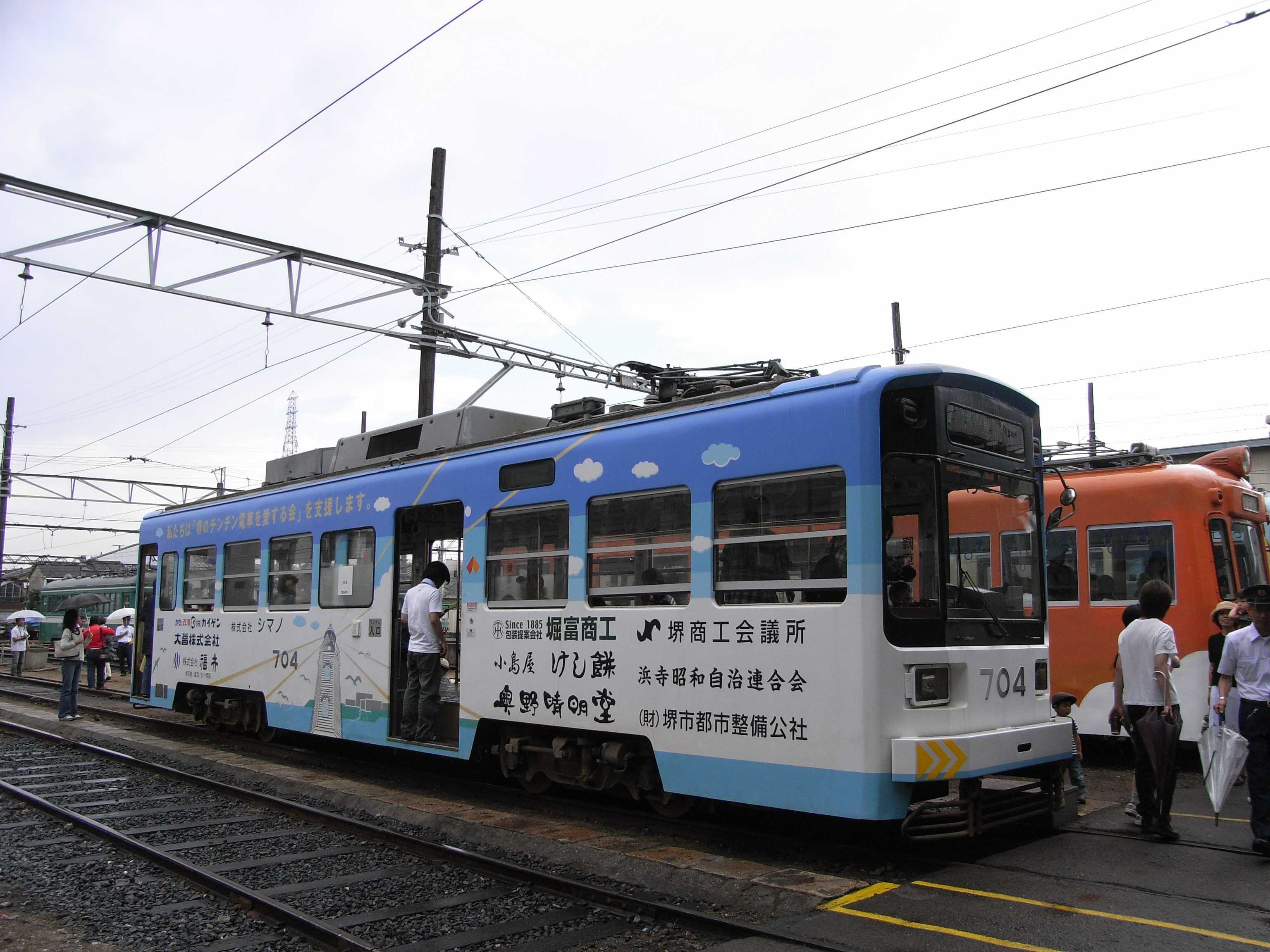 阪堺電車まつり